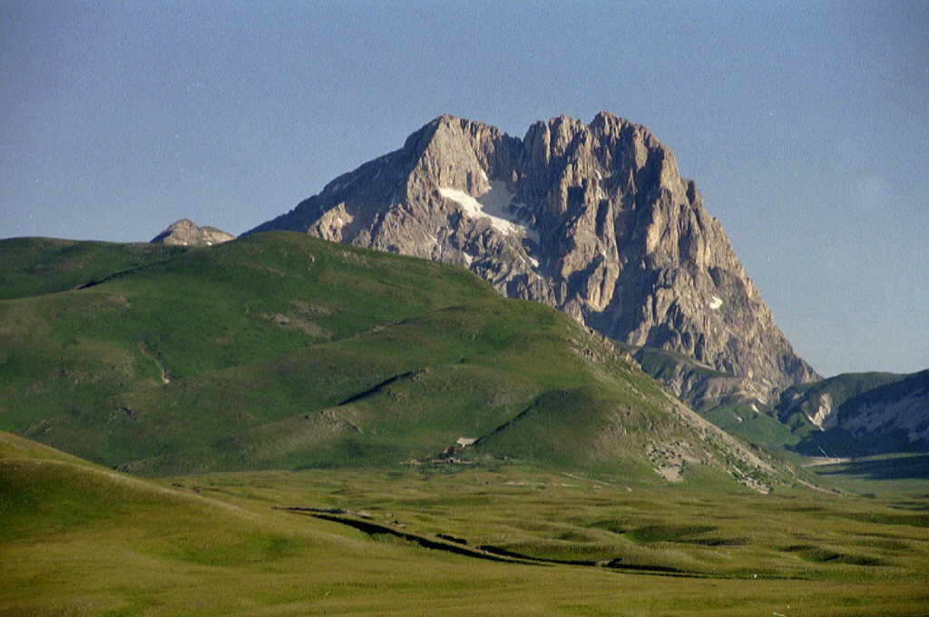 Corno Grande (2912m) Date: 06/06/2000; about 8 AM